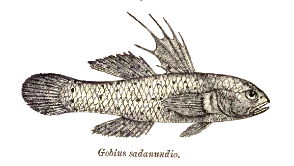 Gobius sadanundio = Stigmatogobius sadanundio (Hamilton, 1822)